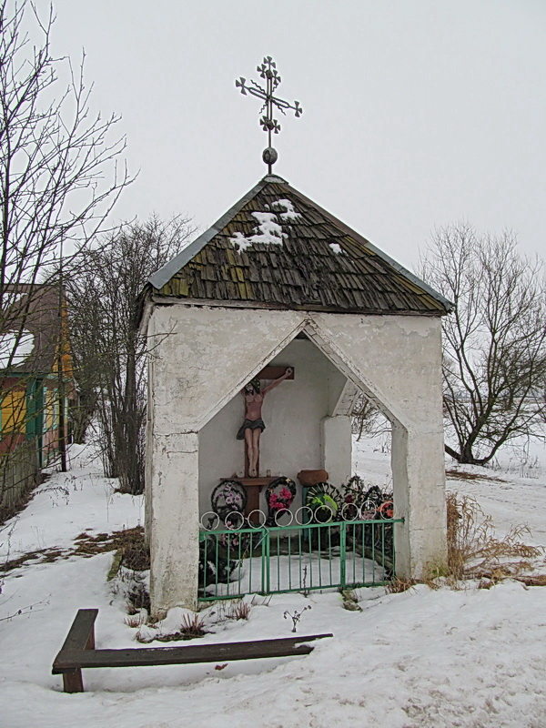 Чарнэлі. Капліца